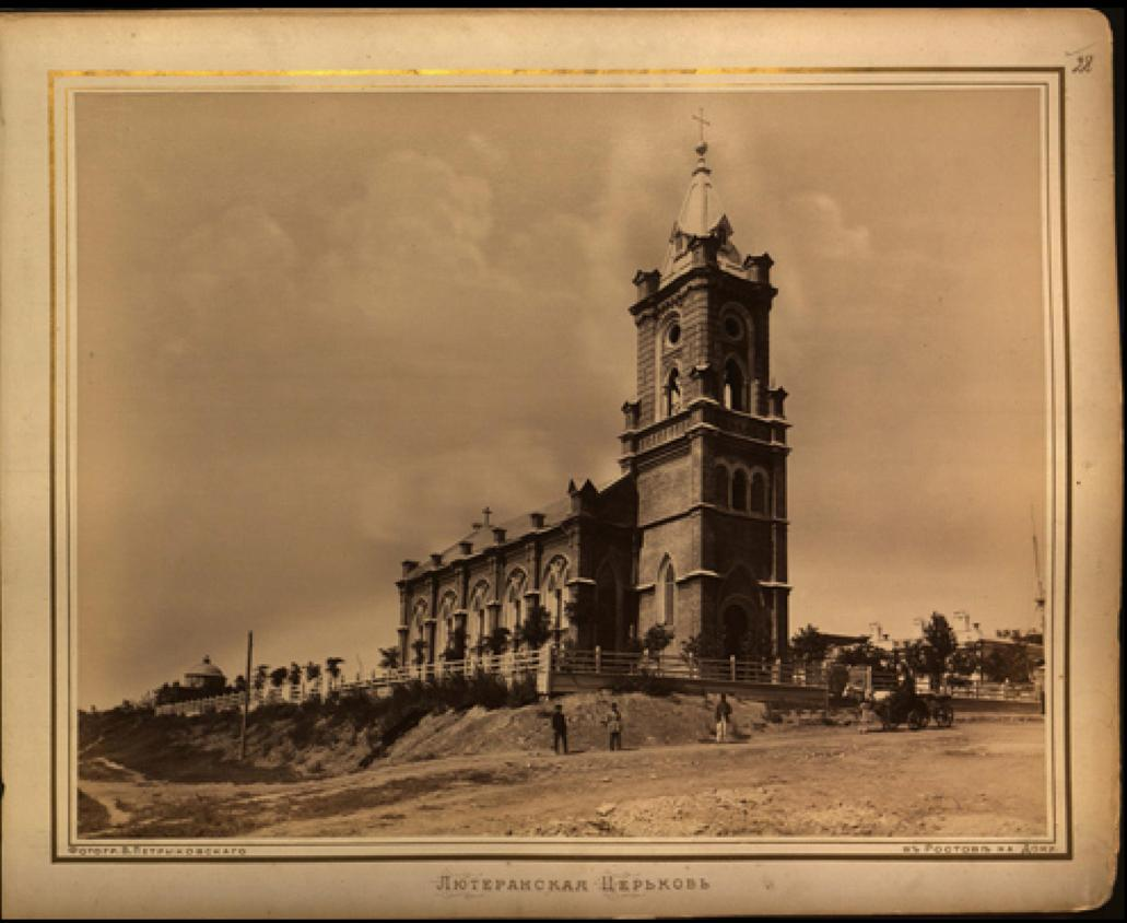 Лютеранская церковь в Ростове-на-Дону до Октябрьской революции.